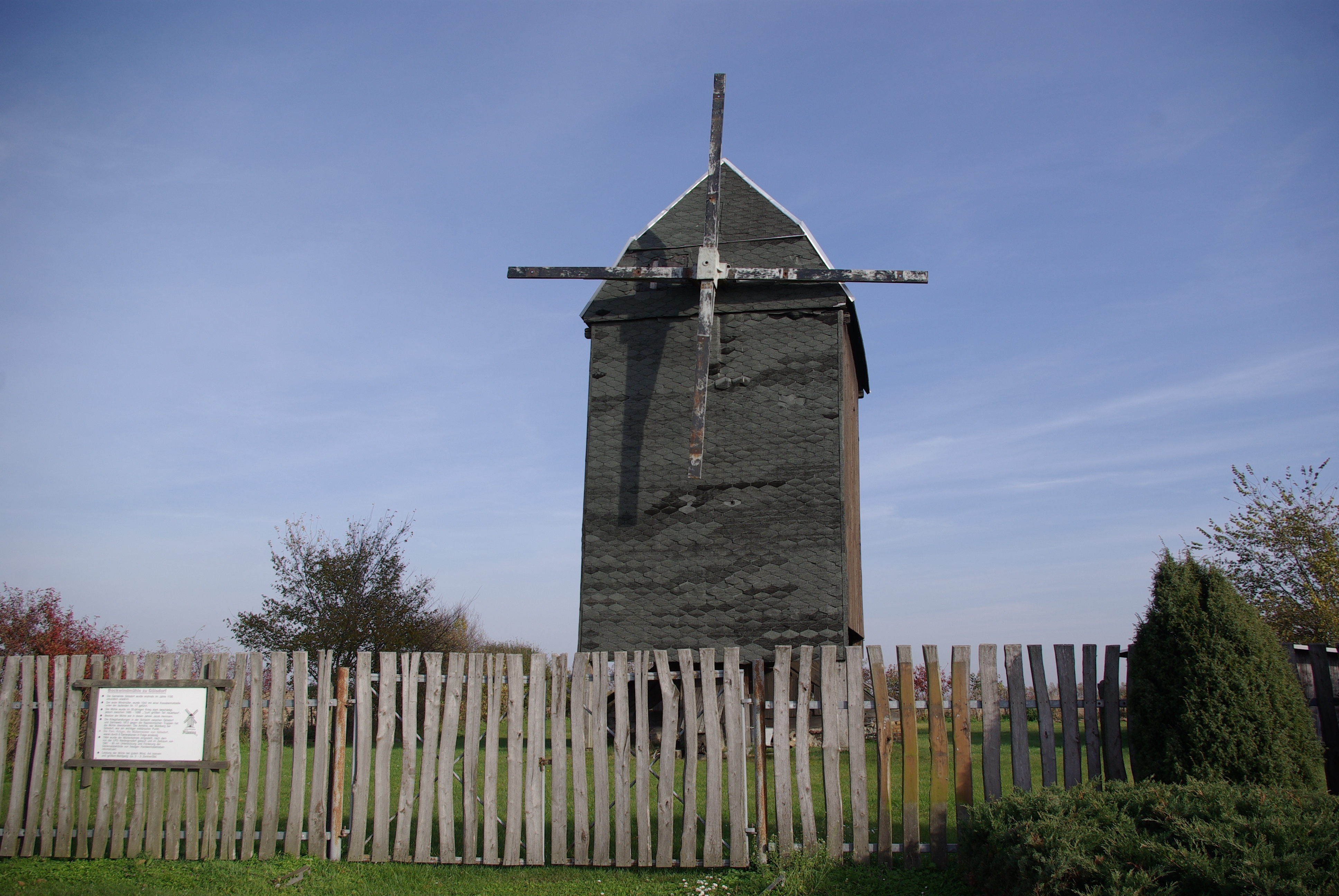 Niedergörsdorf in Brandenburg. Die steht nördlich des Ortsteils Gölsdorf und sie steht unter Denkmalschutz.